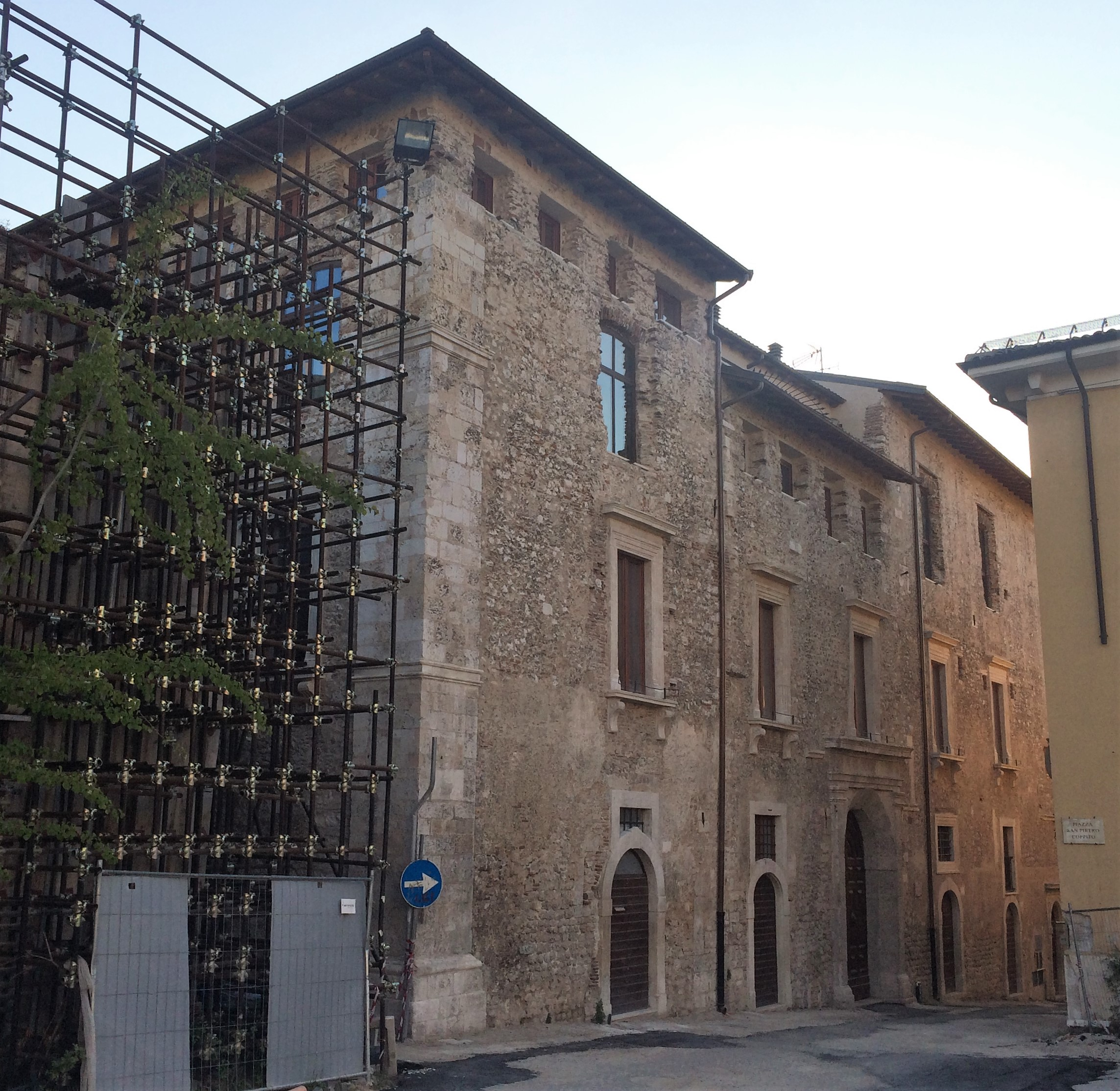 Palazzo Cresi (o Vastarini-Cresi) su via Roma, all'Aquila.